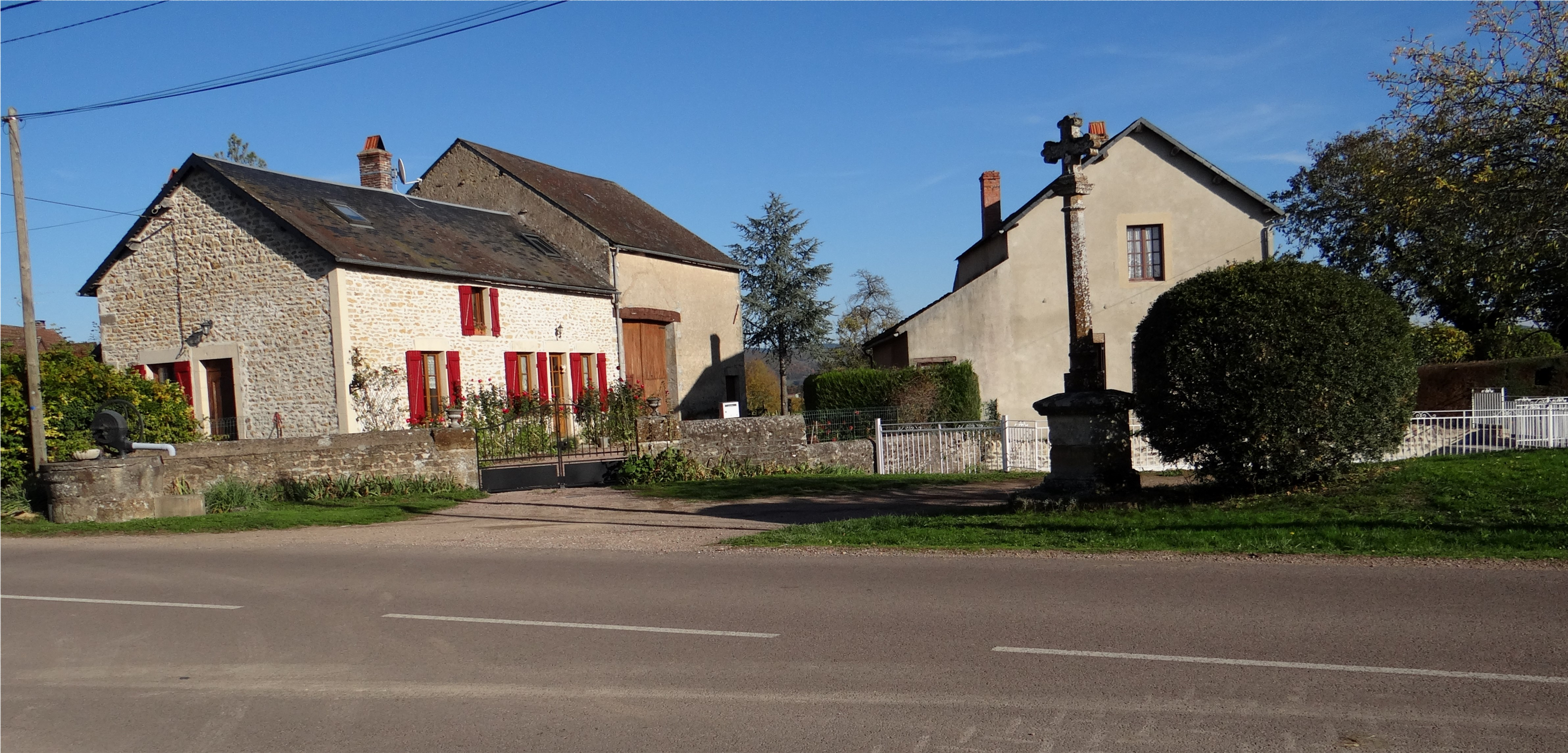 Croix et Lavoir à Bailly, Magny-Lormes, Nièvre, France.